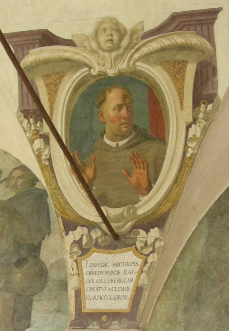 Chiostro di ognissanti, personalità francescane 20 Pasteur de Sarrats